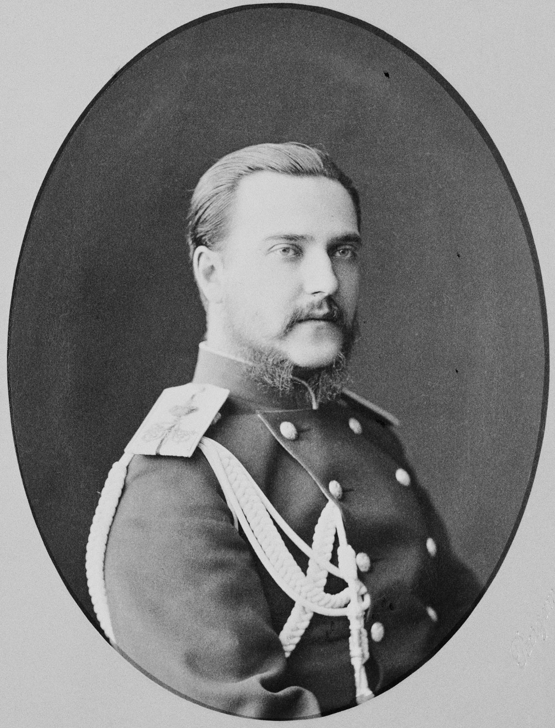 George, Duke of Leuchtenberg